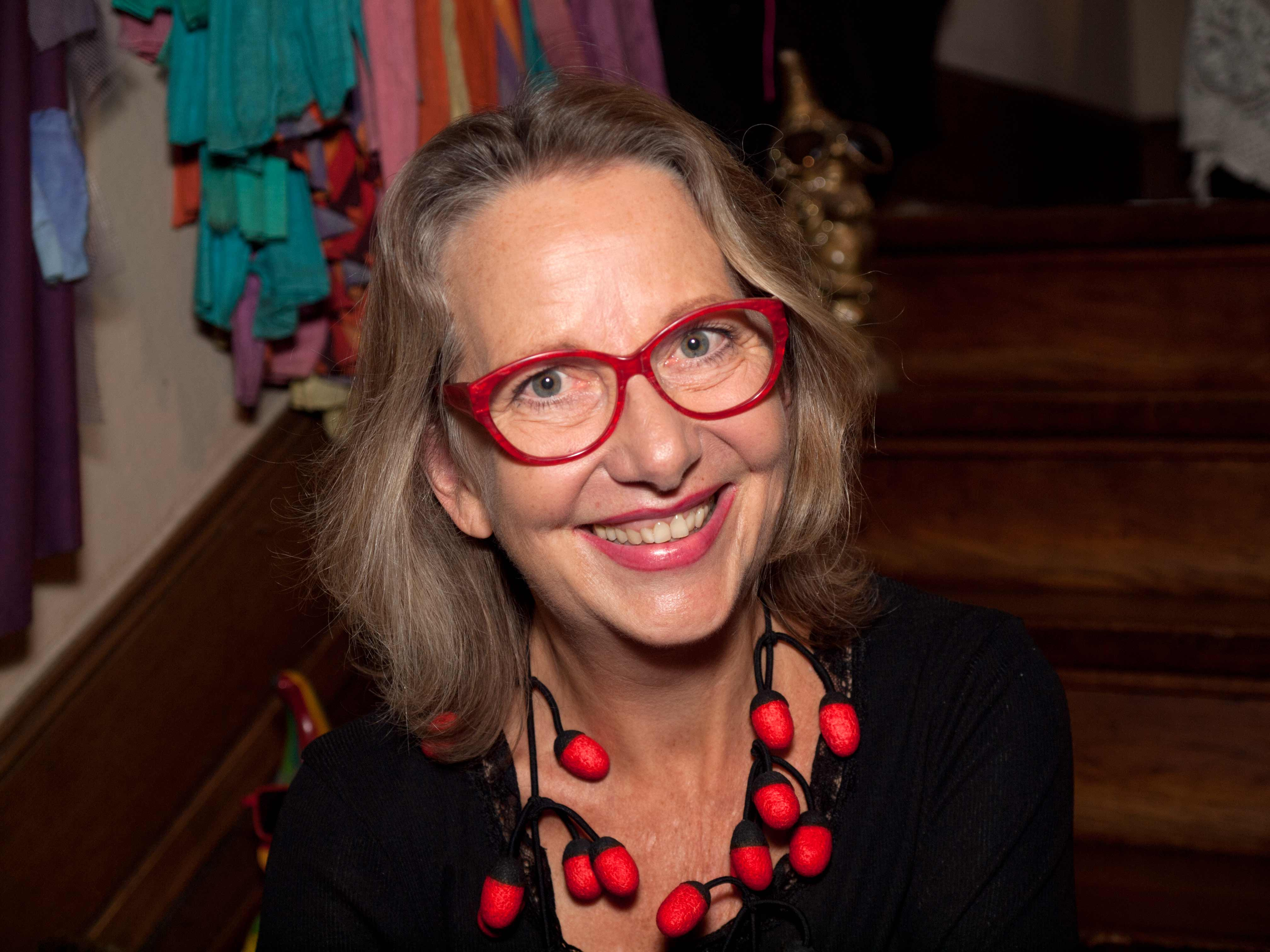 Erica Hänssler, schweizerische Theaterschauspielerin und Mitbetreiberin des Theater Stok in Zürich